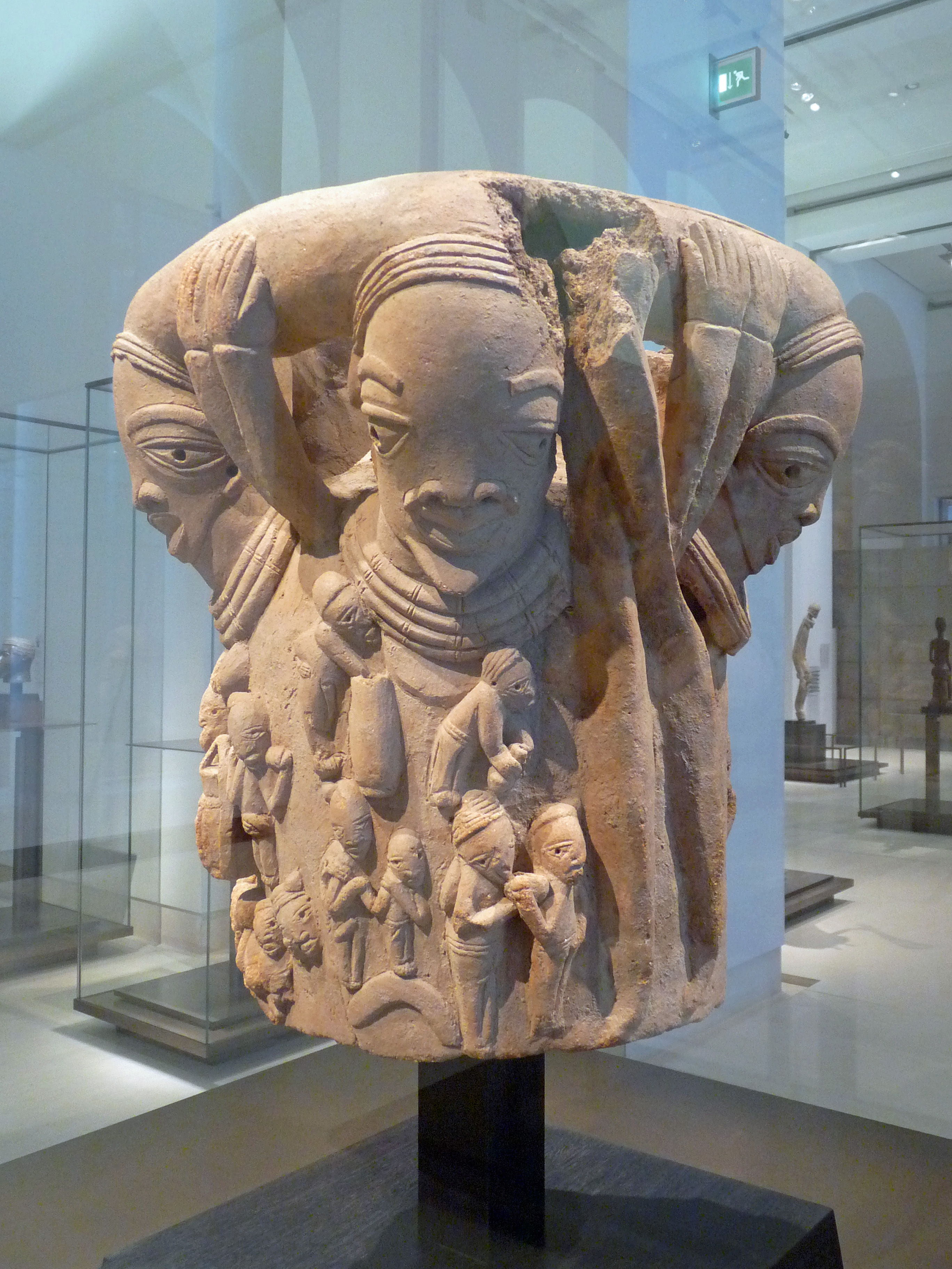 Sculpture de la culture Nok, terre cuite, VIe siècle avant JC-VIe siècle après JC, Nigeria. Pavillon des Sessions, Louvre, Paris.